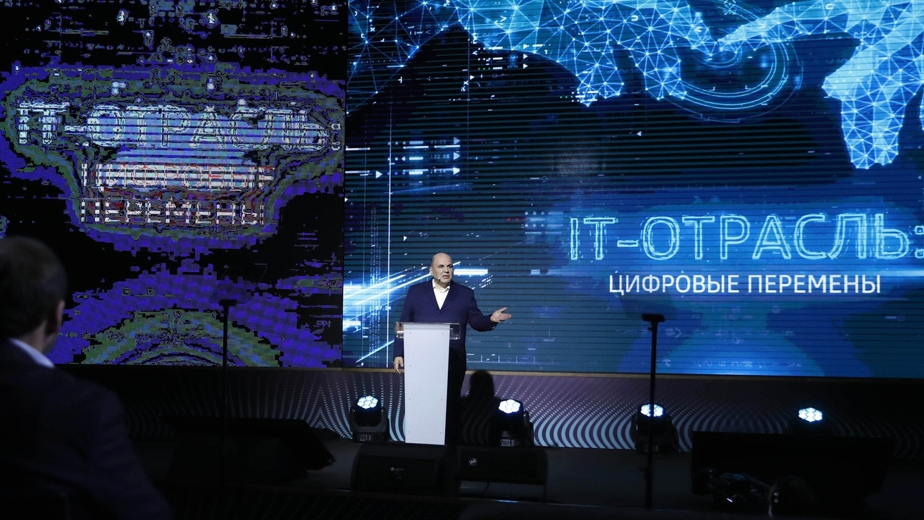 Выступление Михаила Мишустина на панельной дискуссии с участием представителей IT-индустрии